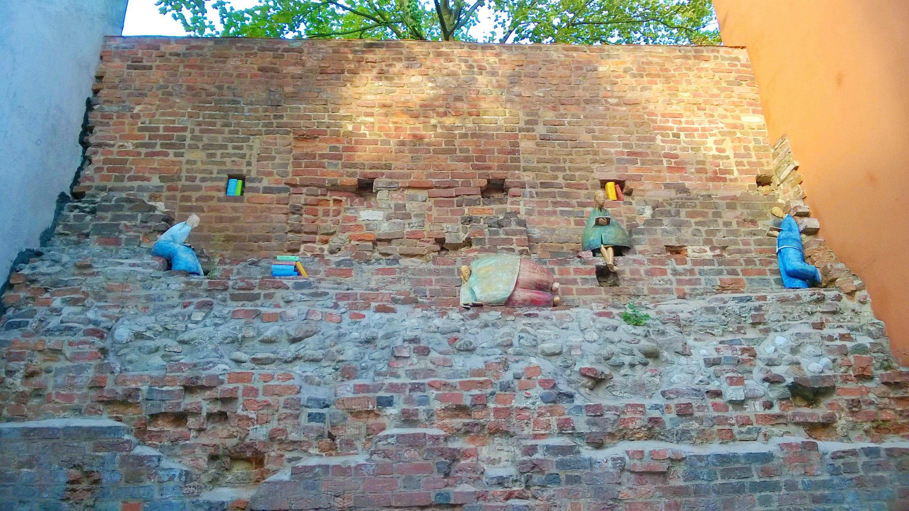 Mury Starego Miasta w Toruniu66